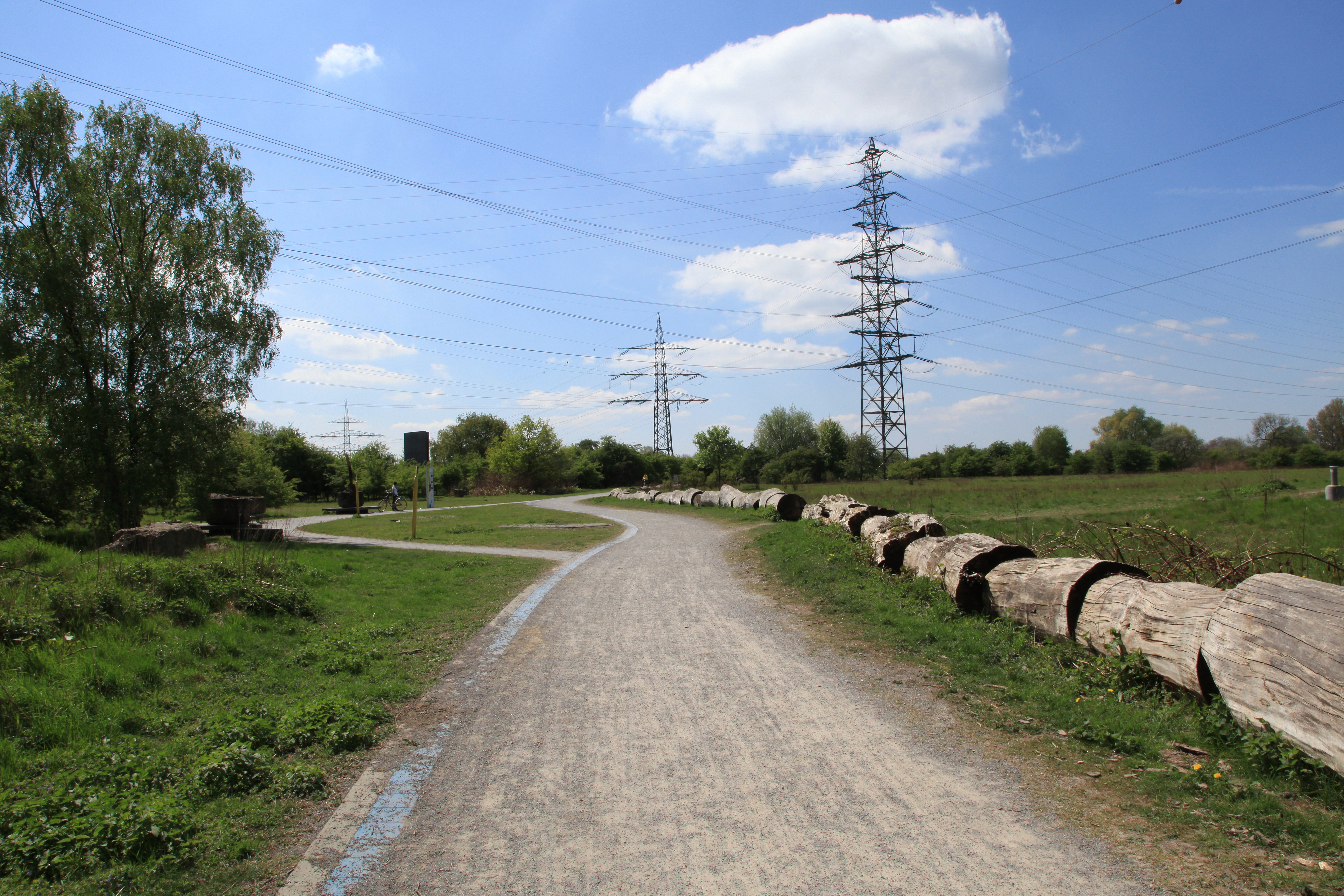 Brache Vondern in Oberhausen